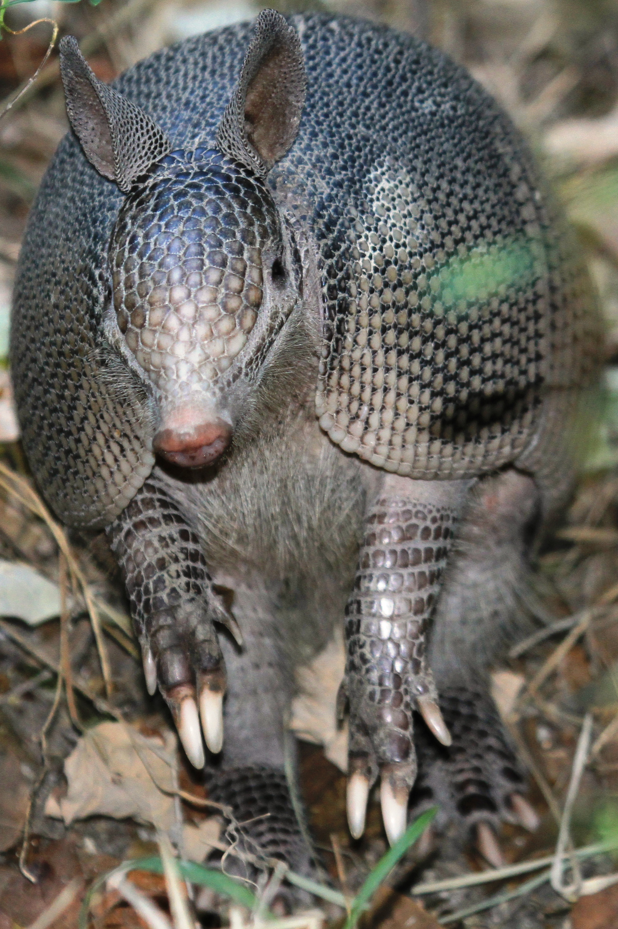 Armadillo en Montemorelos Nuevo León, México